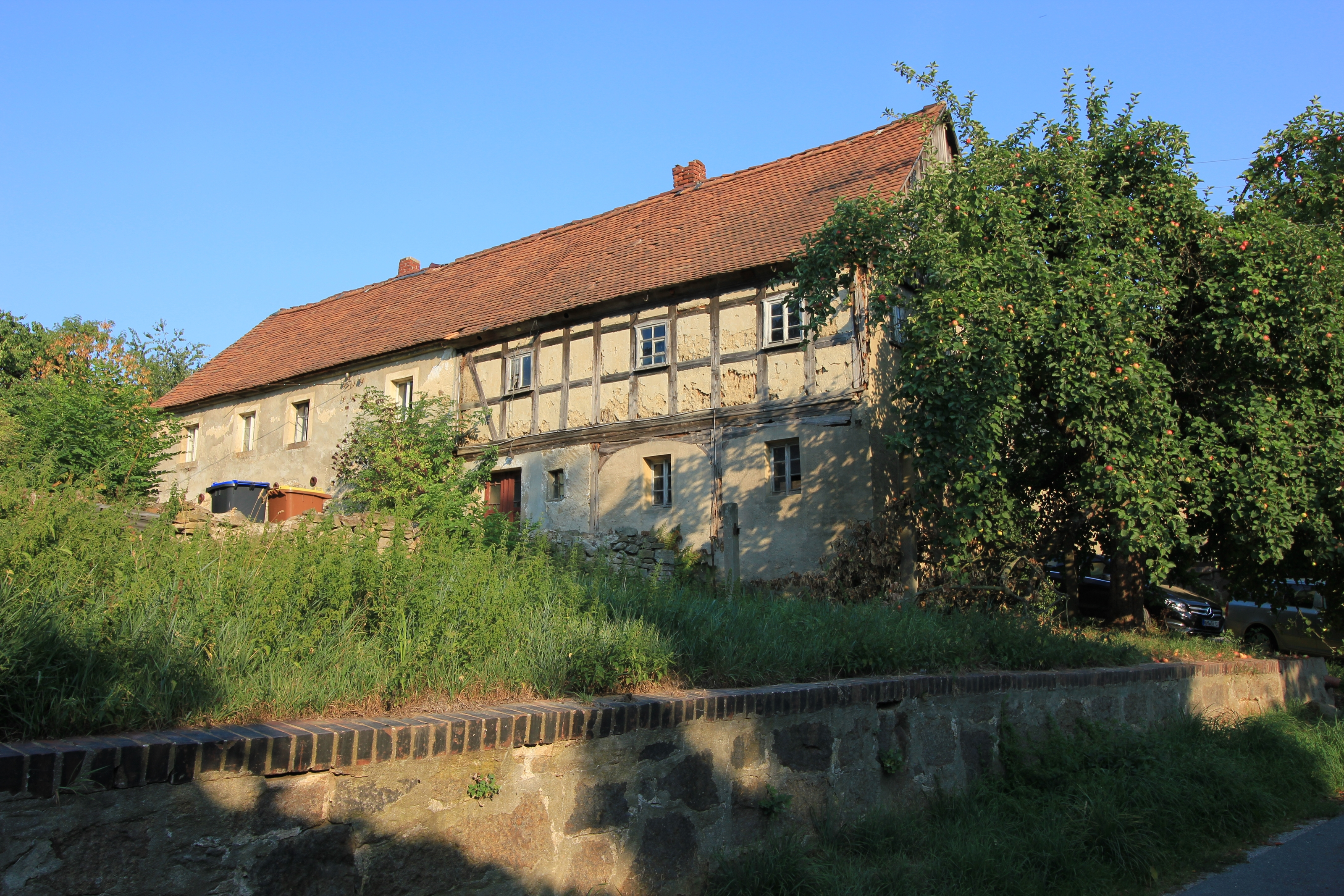 Hornjoserbsce: Domske z hródźu a bróžnja něhdyšeho třistronskeho statoka we Wuježku, čo. 33a.